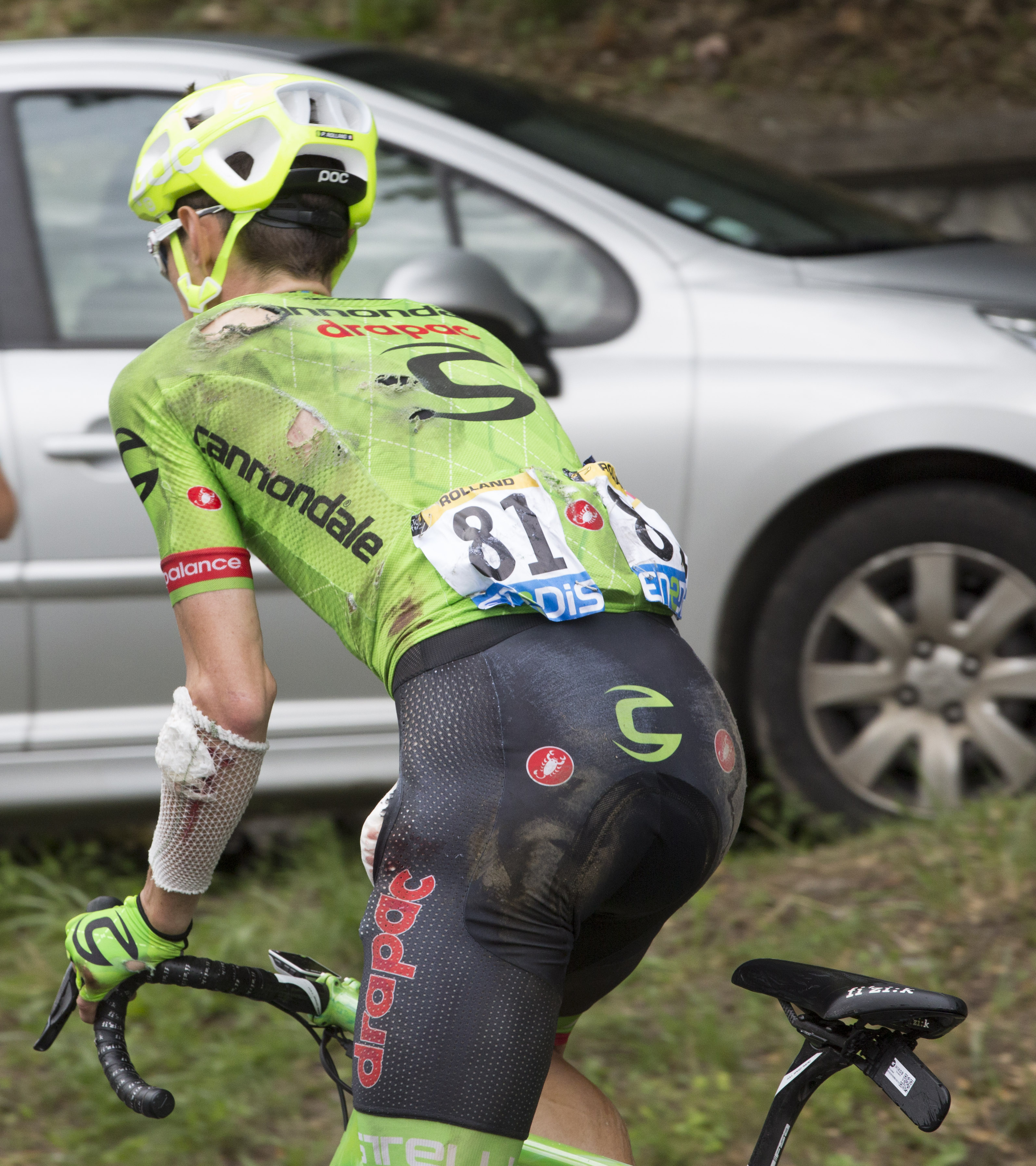 Pierre Rolland